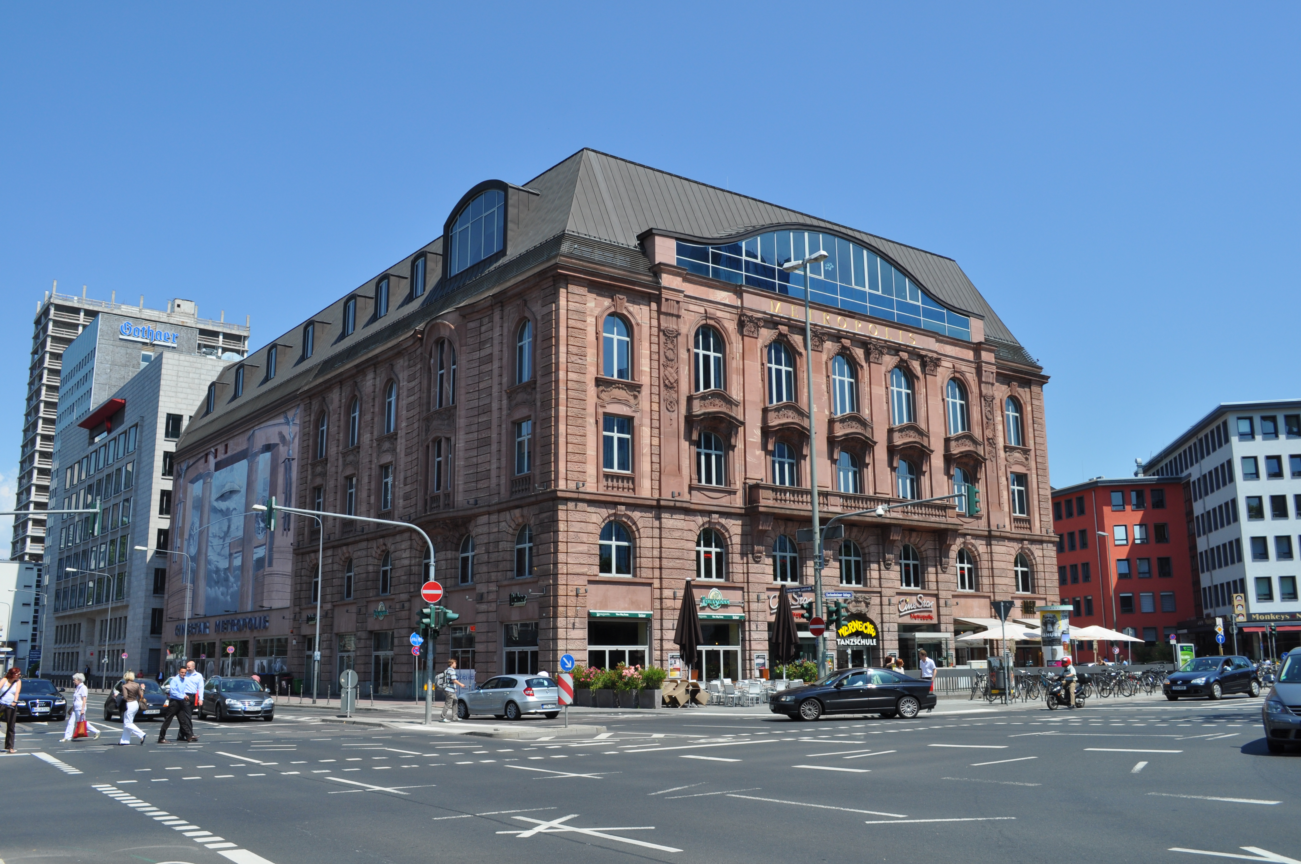 Cinestar Metropolis (ehemaliges Volksbildungsheim) in Frankfurt